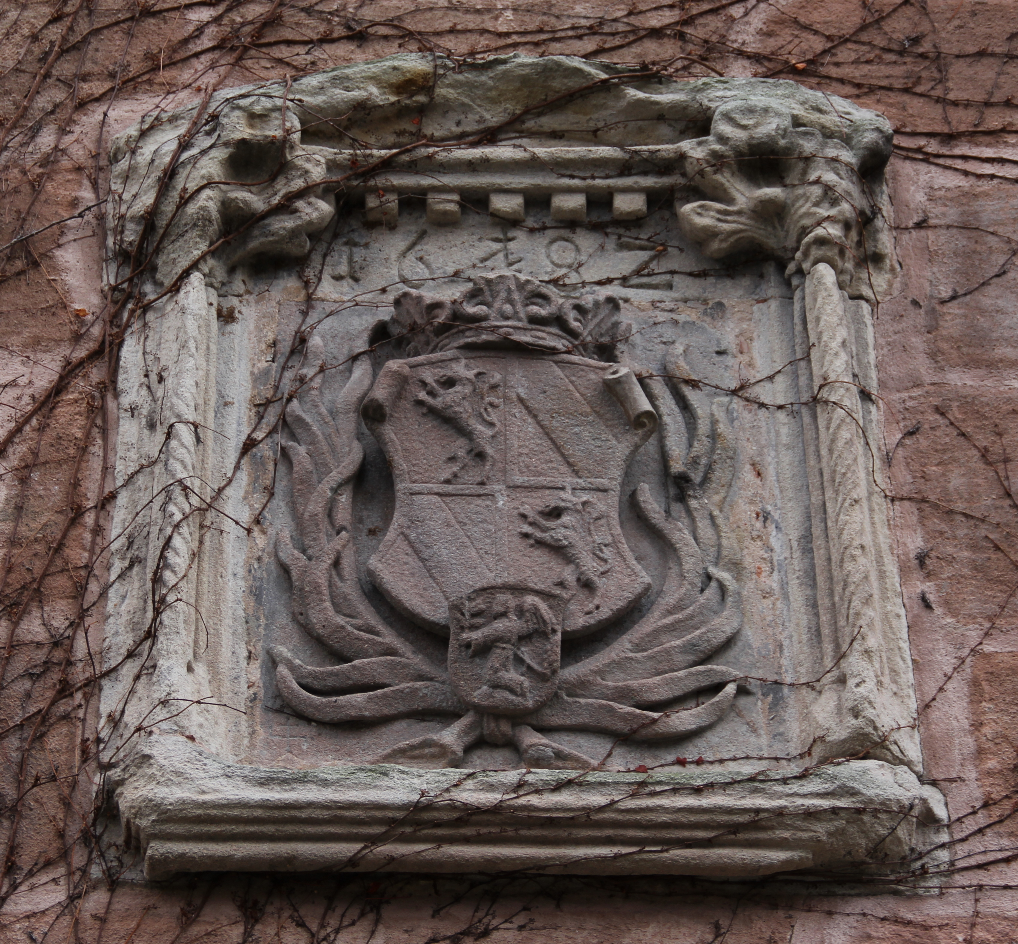 Pfinzingschloss, Wappen über dem Eingang